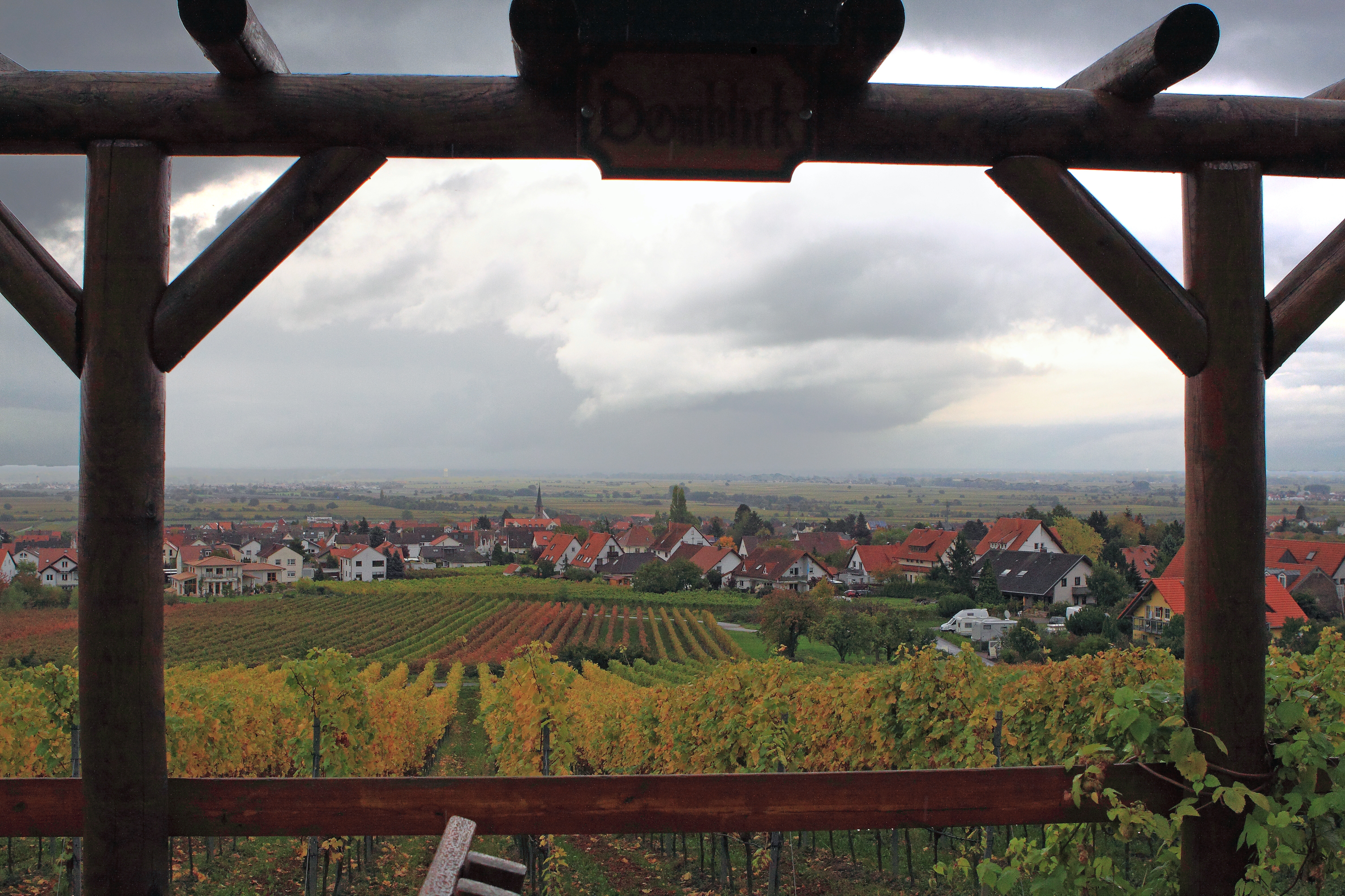 Aussichtpunkt "Domblick"